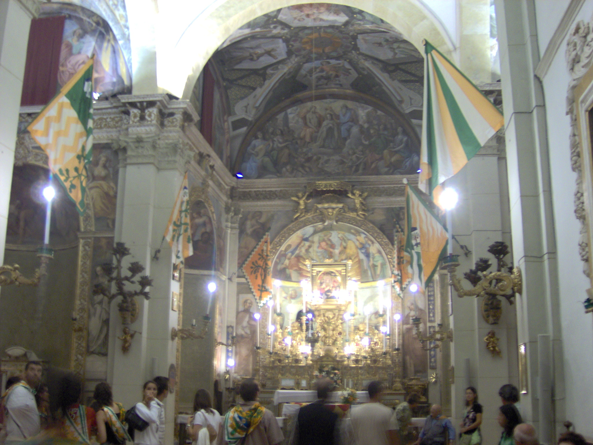 Image Palio dell'Assunta (16/08/2006) - Siena